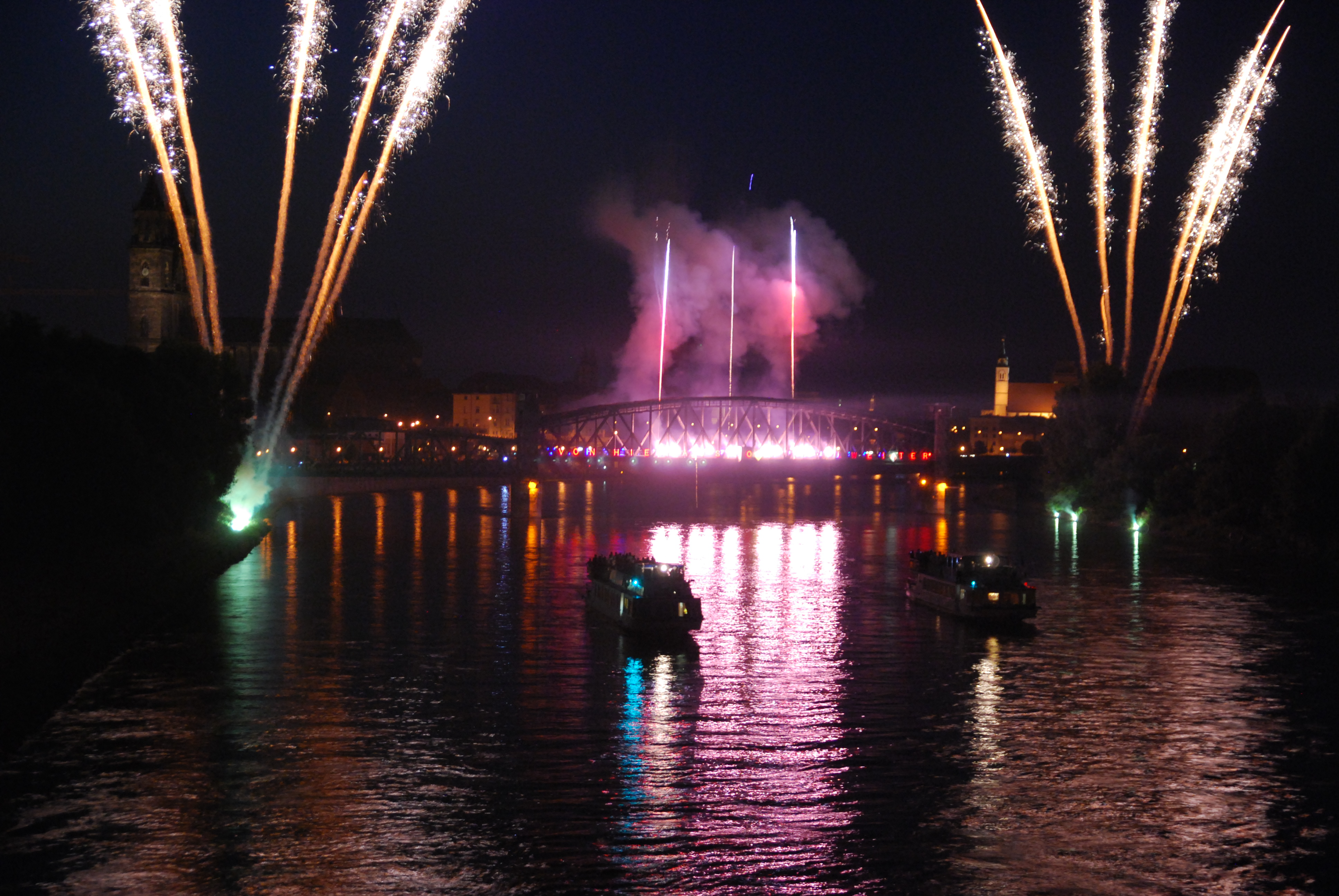 Fest "Elbe in Licht und Flammen" in Magdeburg mit verschiedenen Veranstaltungen